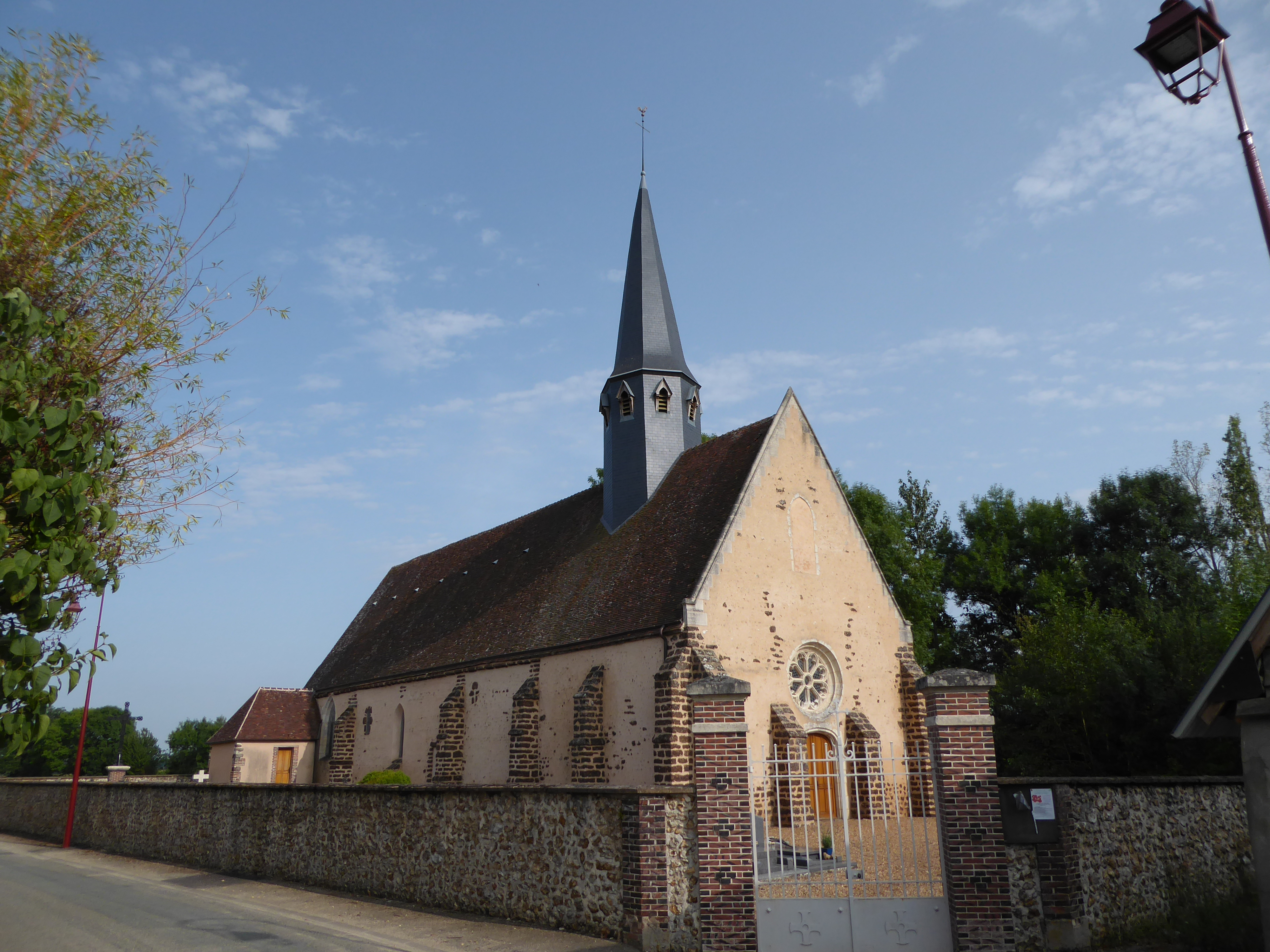 église Saint-Denis, Saint-Denis-des-Puits, Eure-et-Loir (France).